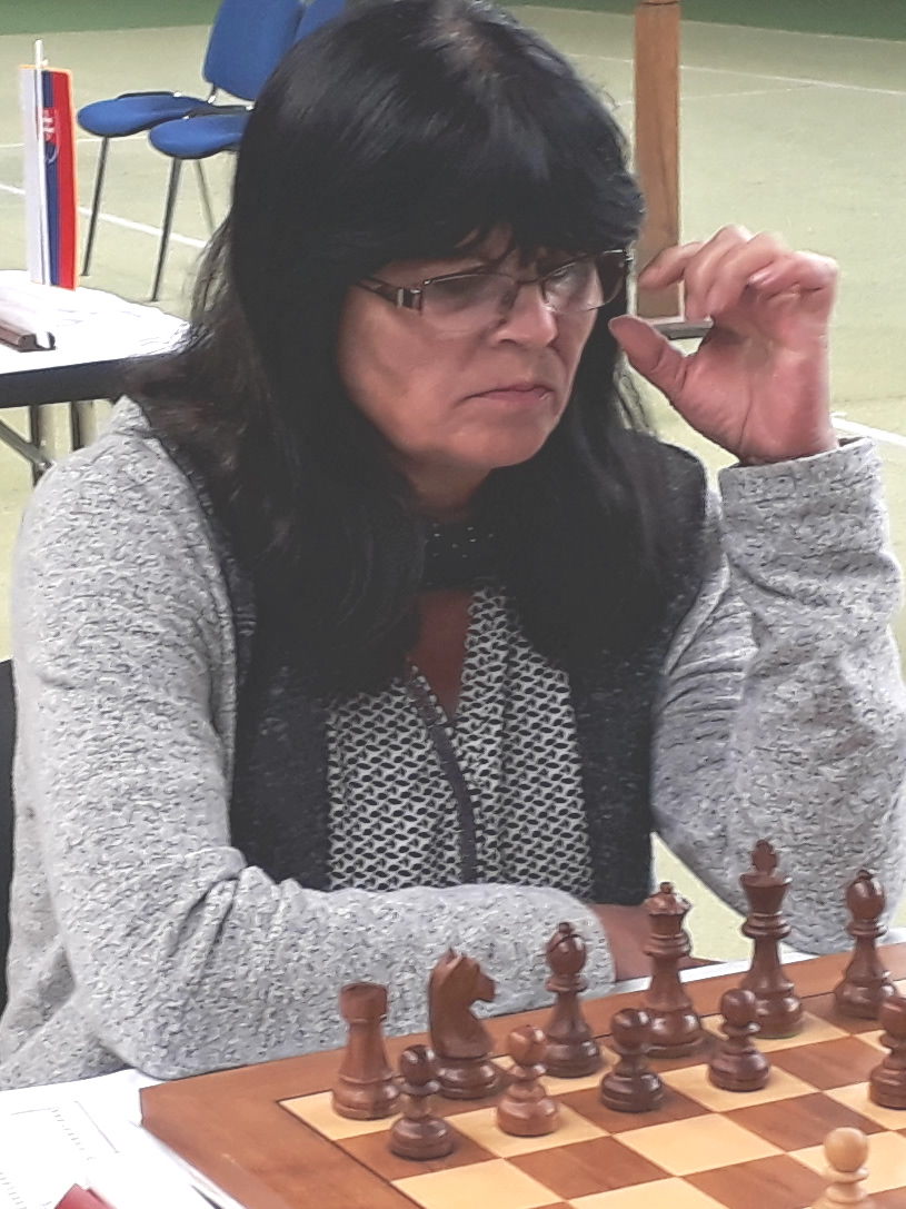 Mirjana Medic, Runde 4, Mitropa Cup 2019 Frauen, Radenci.